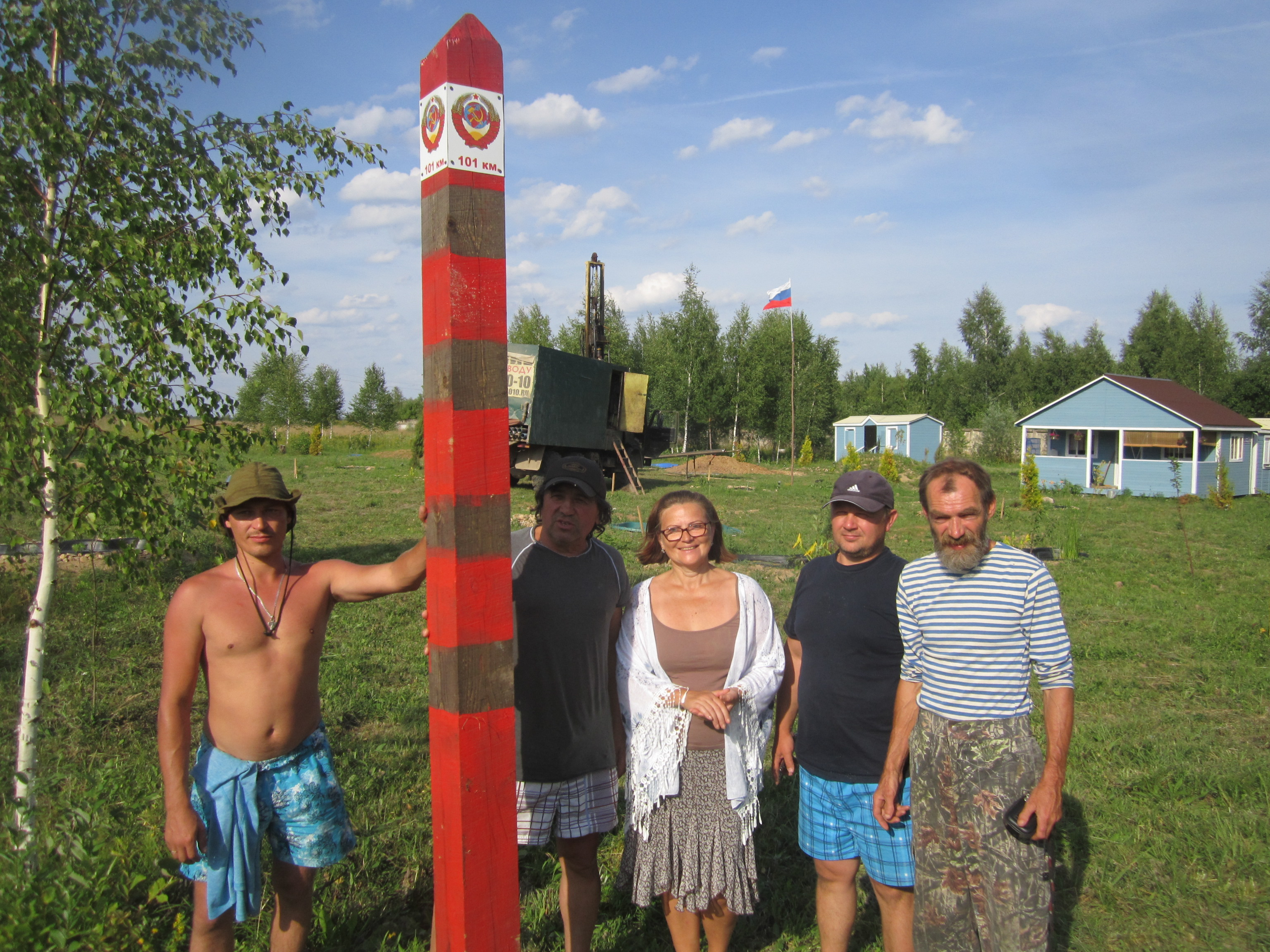 Установка памятного знака 101 километр Таруса, д.Строитель